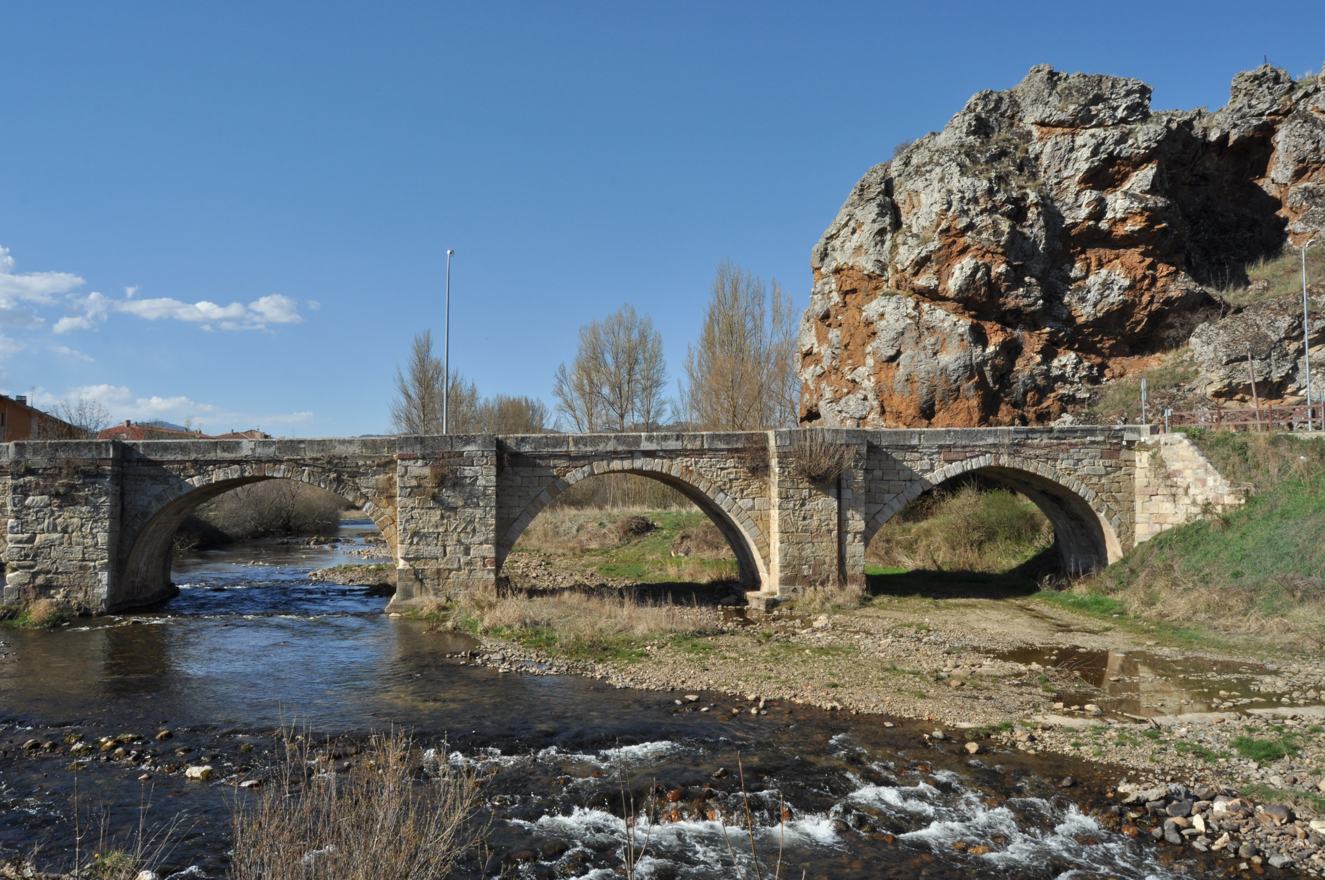 Cervera de Pisuerga - 024